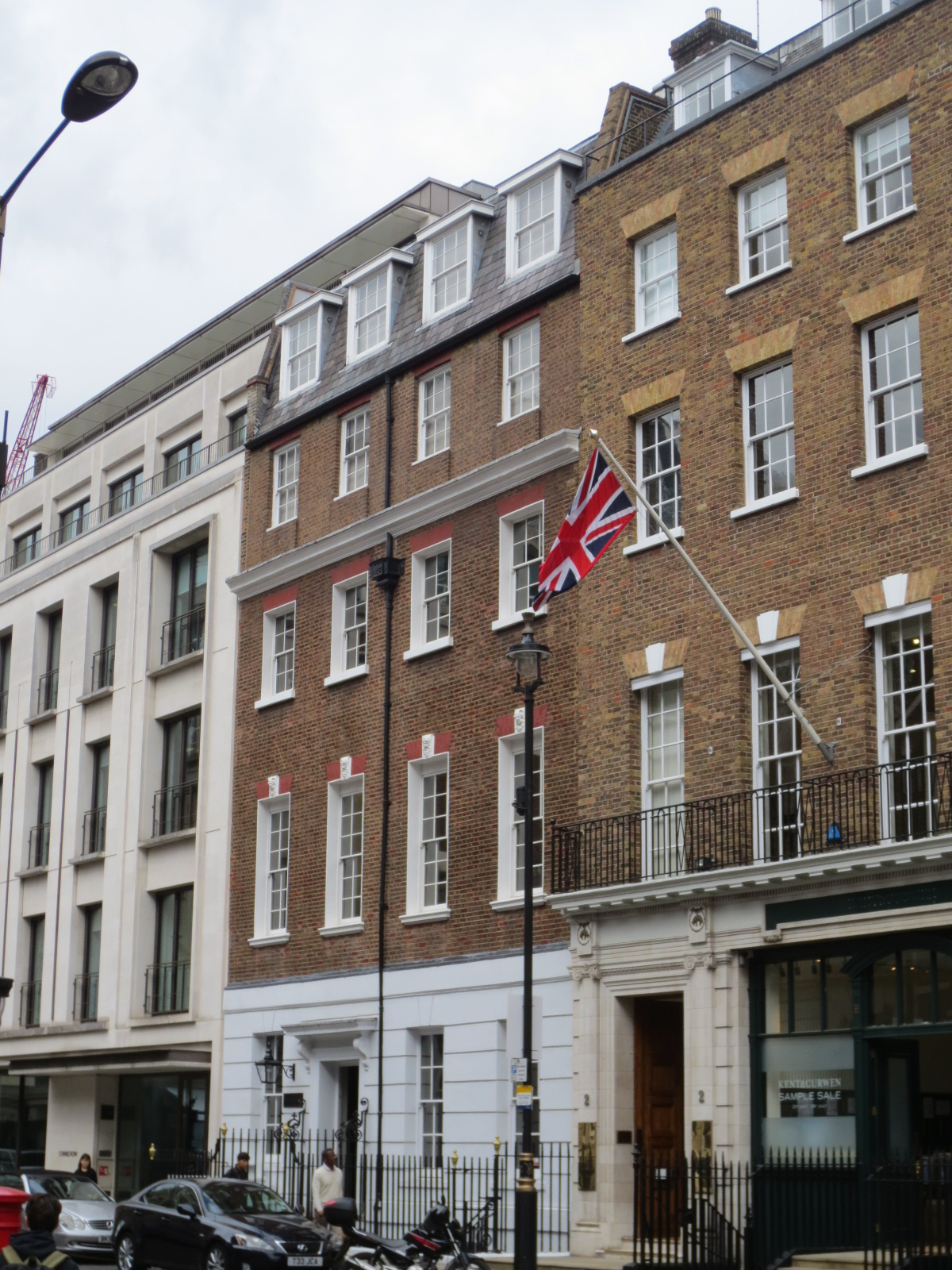 Édifice abritant originalement Apple Records 2